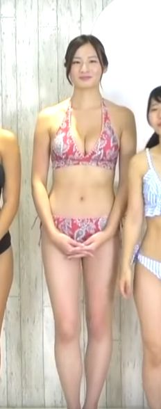 シャベチャン 清瀬汐希